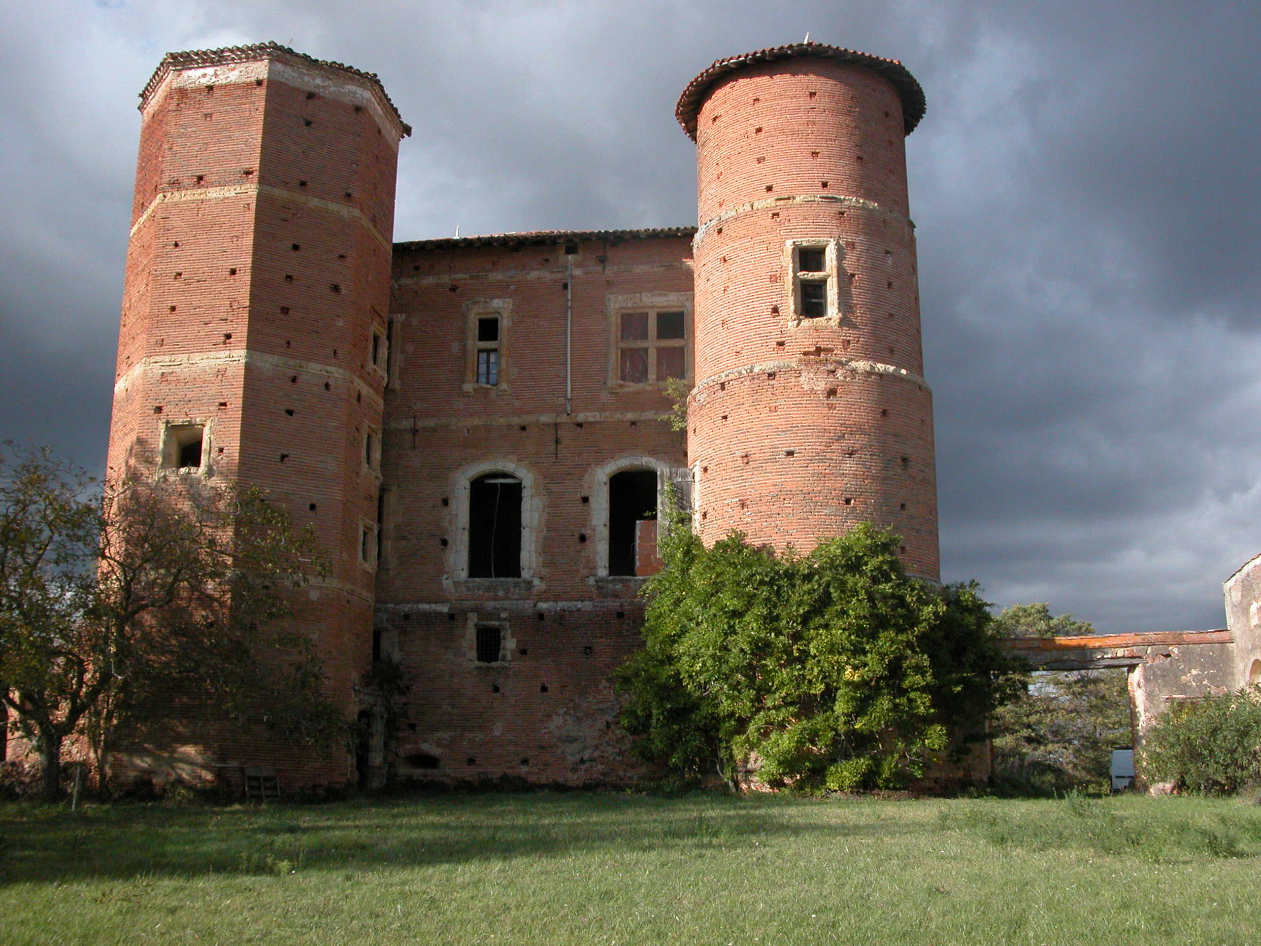 Chateau Nogarède a Sieuras